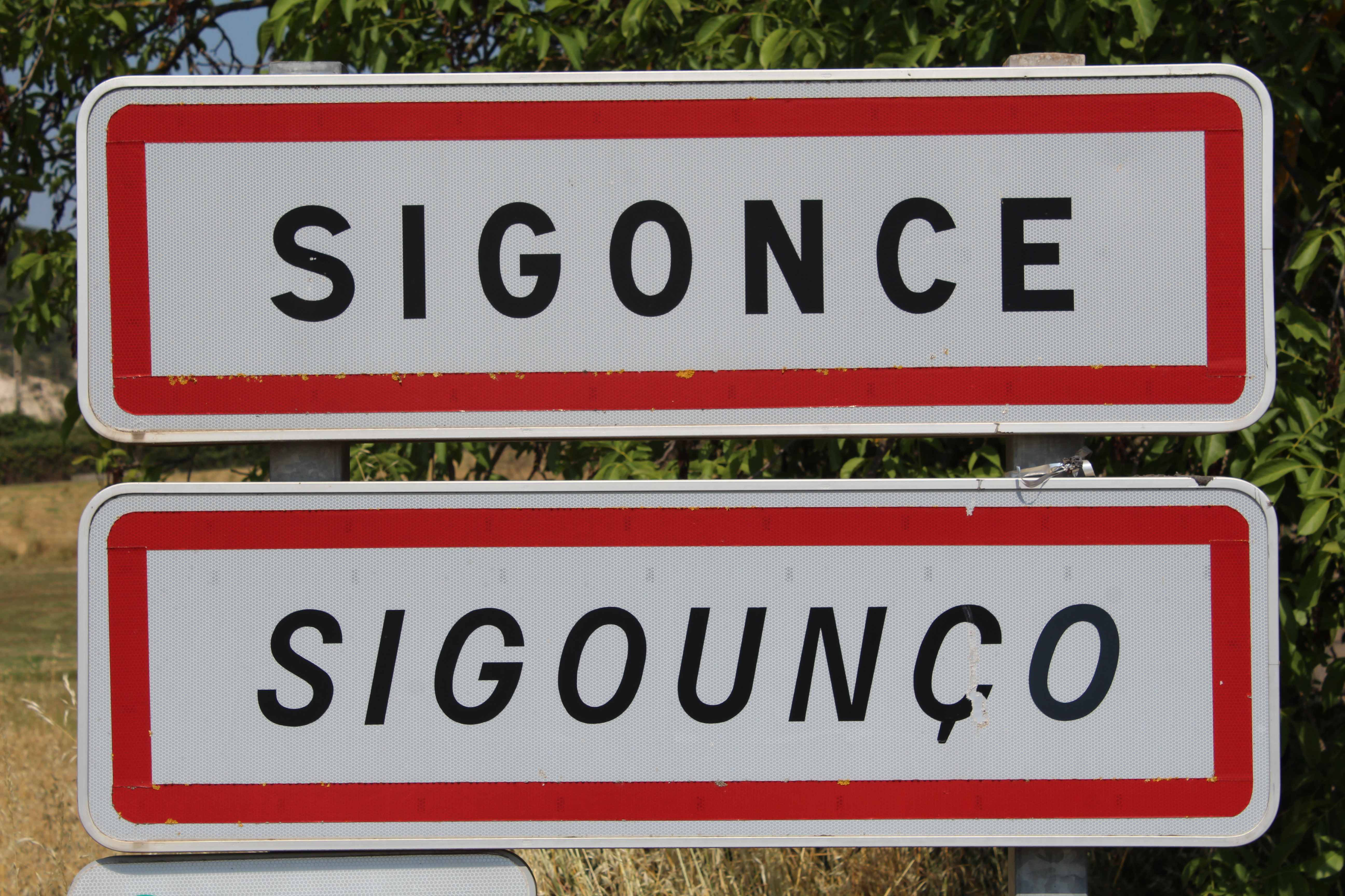 Panneau d'entrée dans Sigonce.